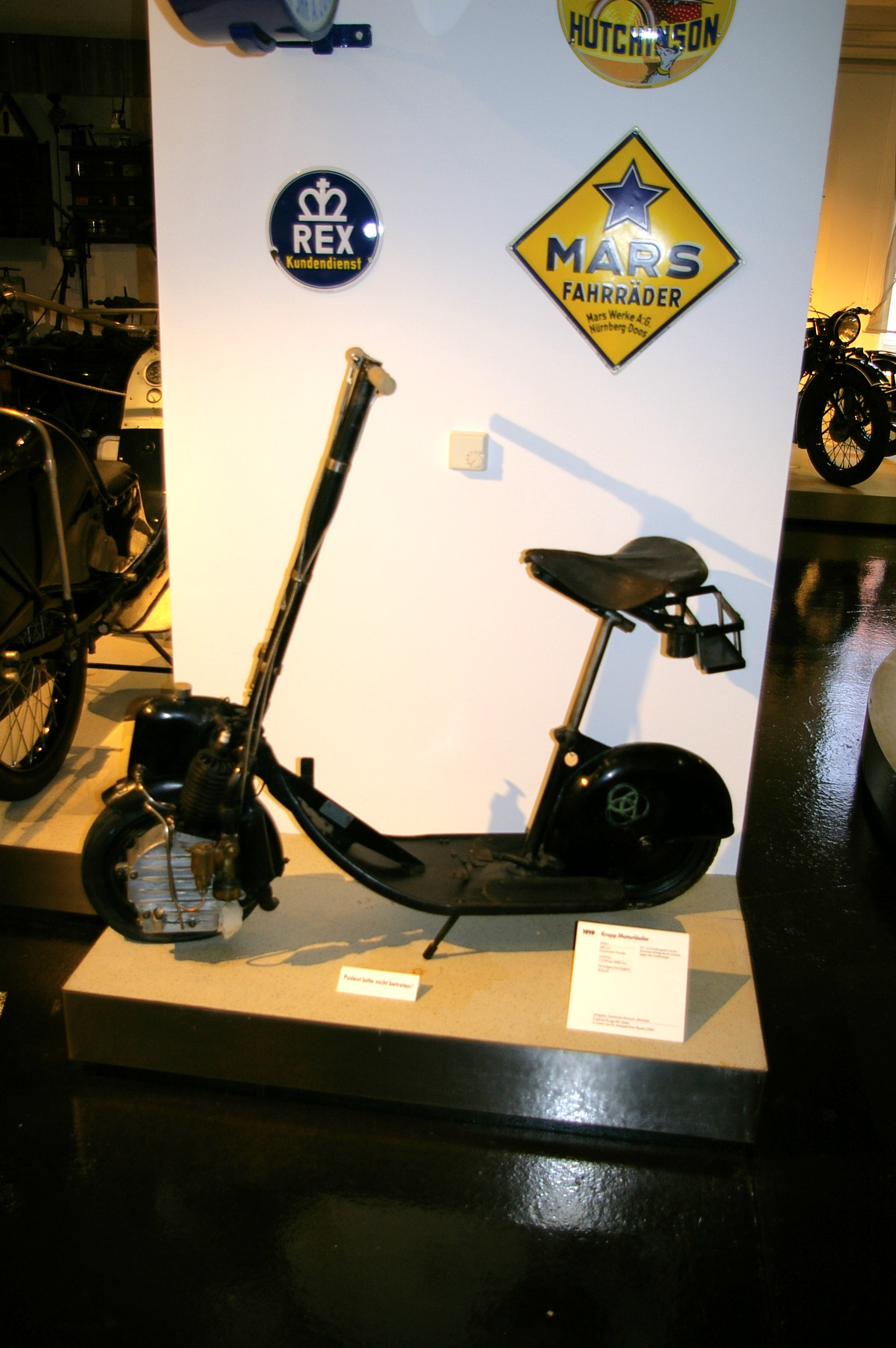 Krupp-Roller